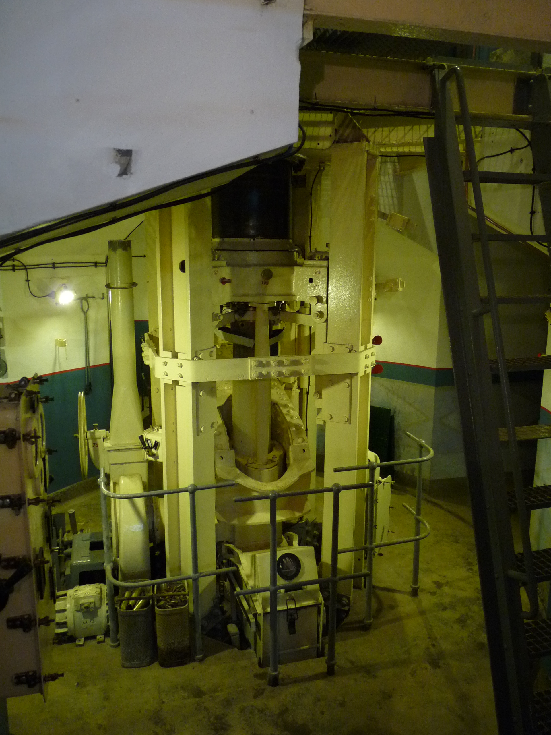 Tourelle de Mitrailleuses du Bloc 3 du Petit Ouvrage de Laudrefang le 01-05-2011. Le Bloc 3 est prit en charge par l'Association de Sauvegarde des Petits Ouvrages de Laudrefang et Téting (ASPOLT).